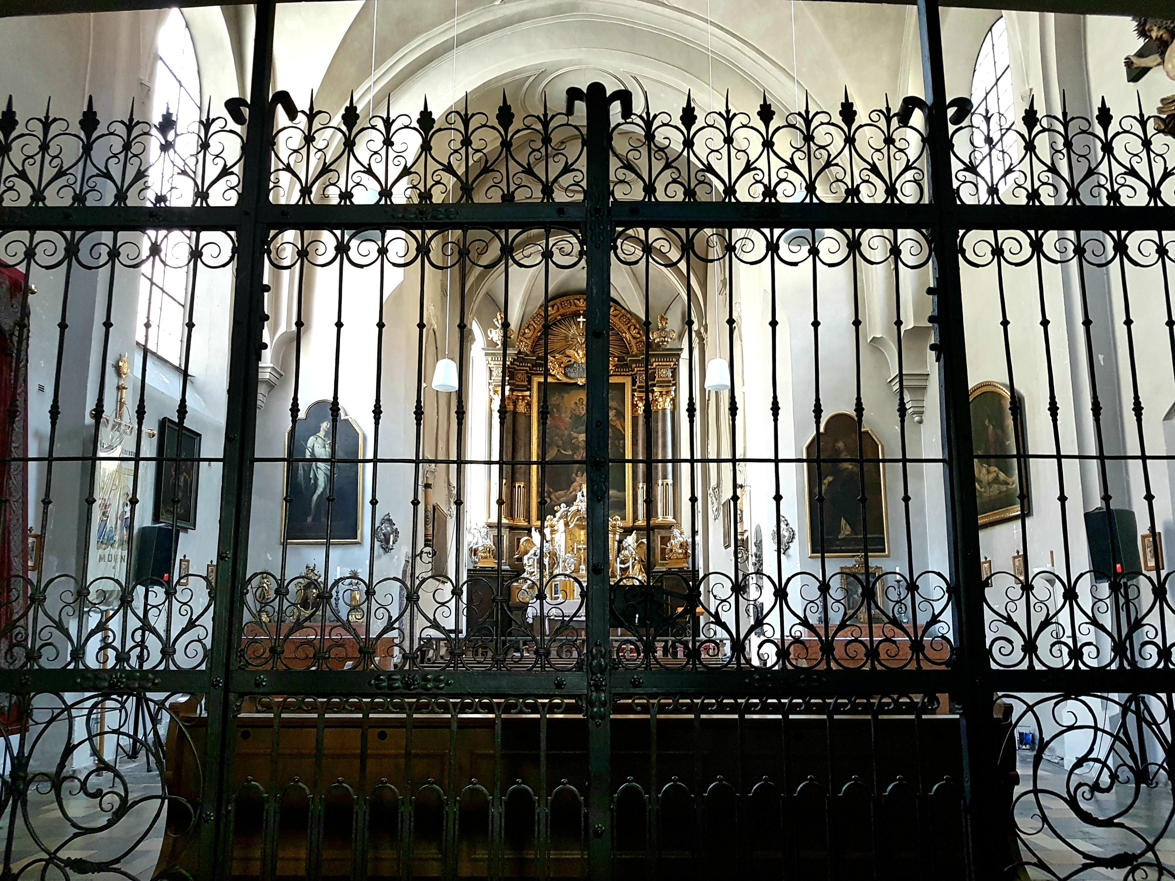 München, Allerheiligenkirche am Kreuz, Innenraum mit Blick zum Chor.